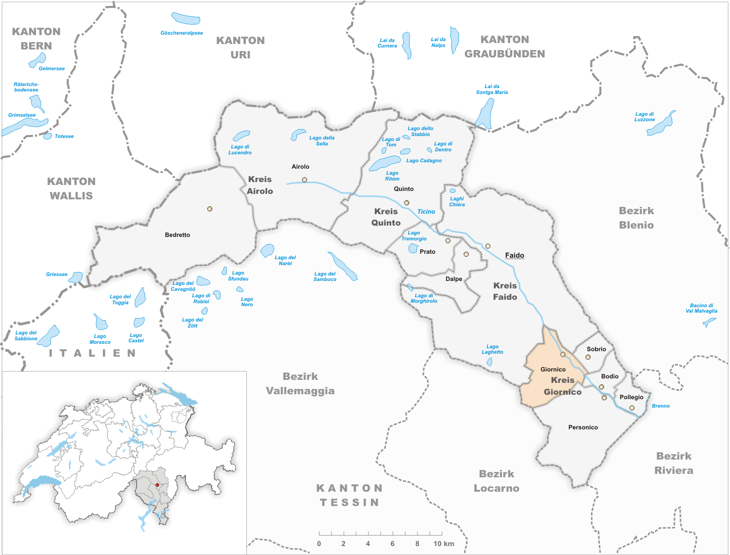 Municipality Giornico